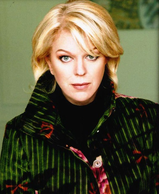 La chanteuse de jazz française Anne Ducros